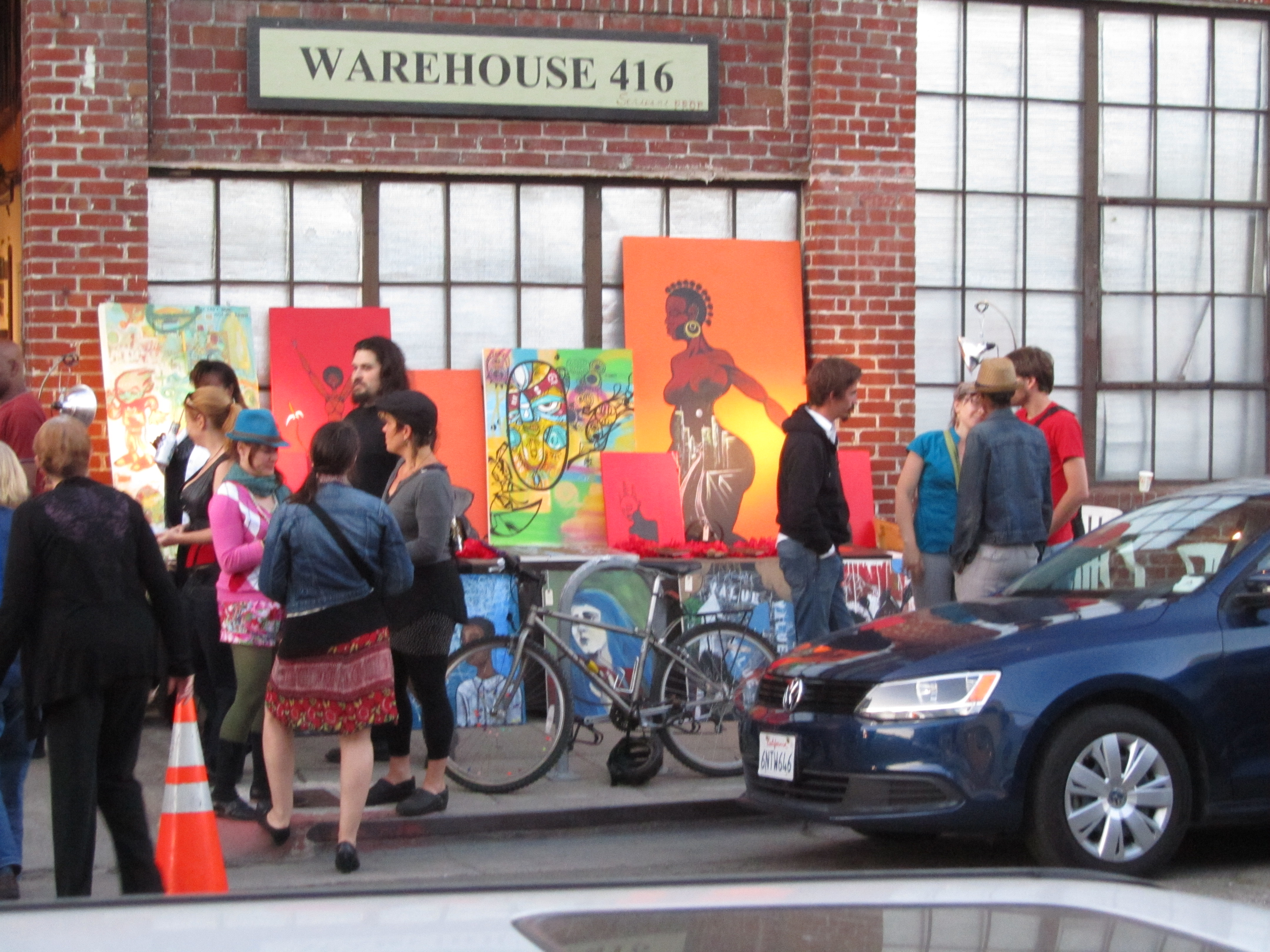 Street scene at Art Murmur.